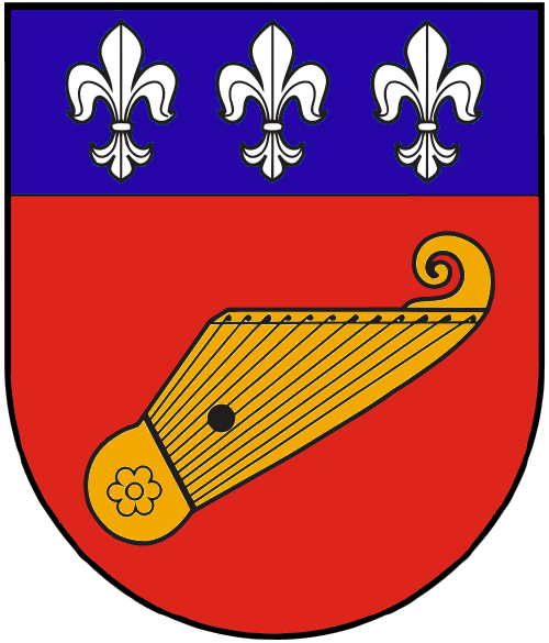 Krekenavos herbas